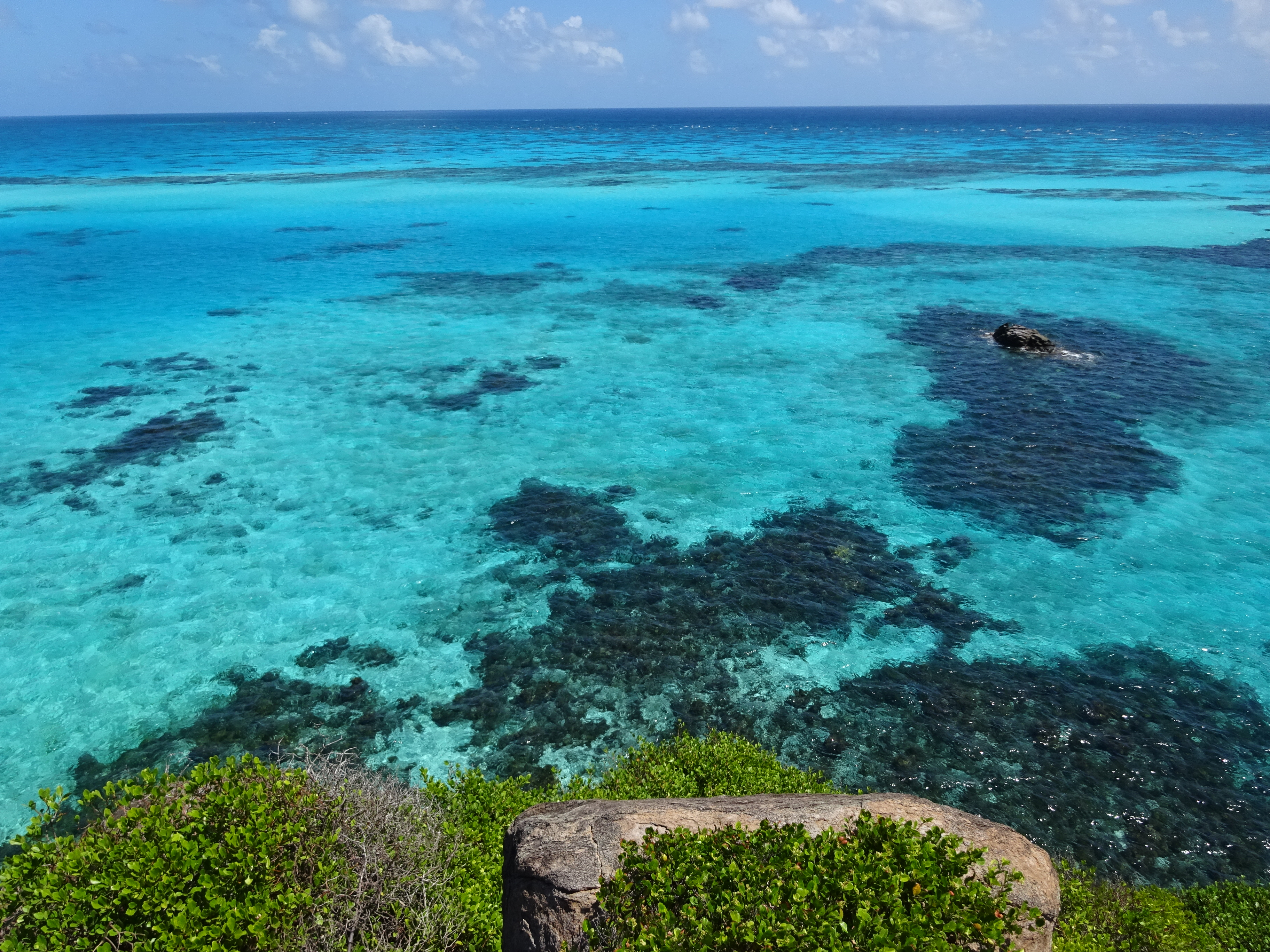 Formaciones coralinas en el parque nacional natural Old Providence McBean Lagoon, en frente de Cayo Cangrejo